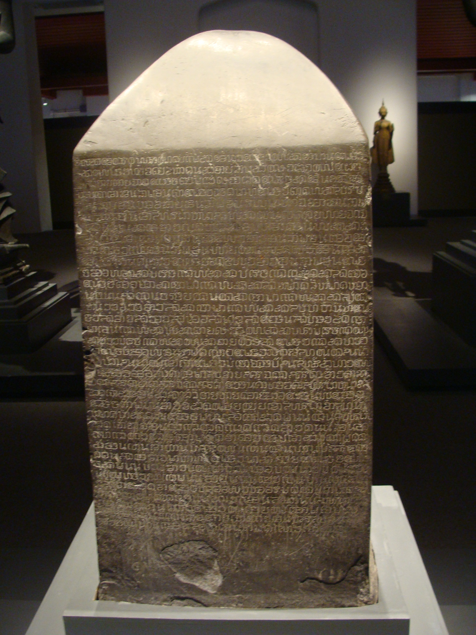 Фотографія кам'яної стели з тайським текстом.